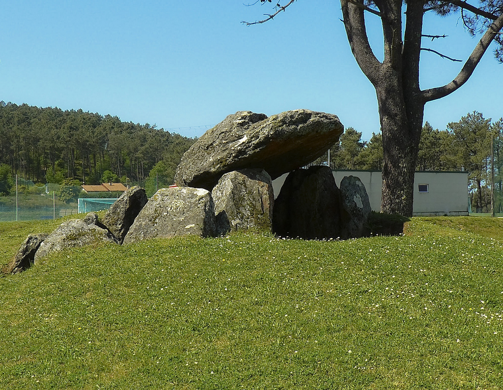 Folmen de Meixoeiro - Mos